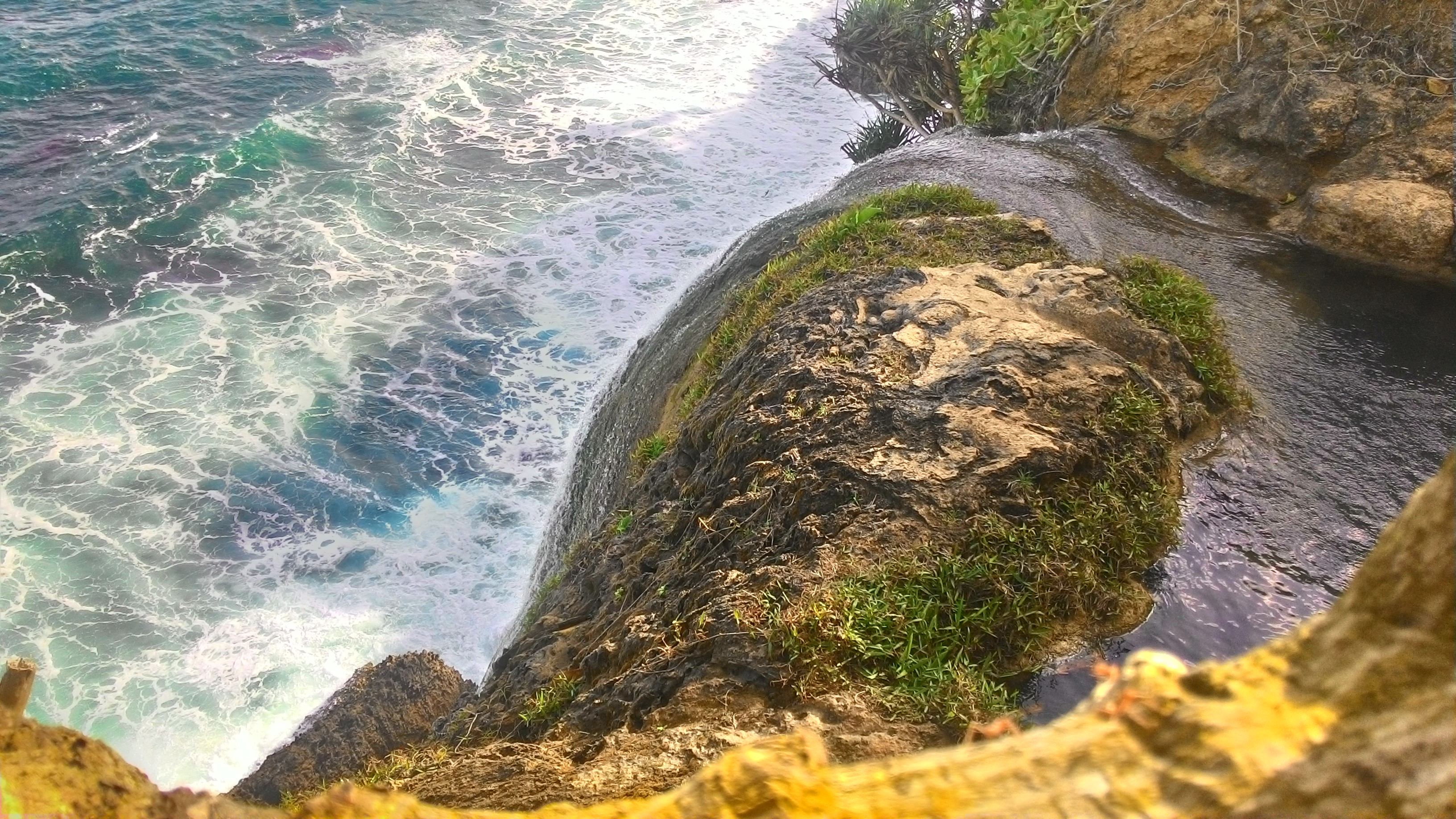 Air terjun umbul waru dilihat dari atas Bakung, Blitar, Jawa Timur.